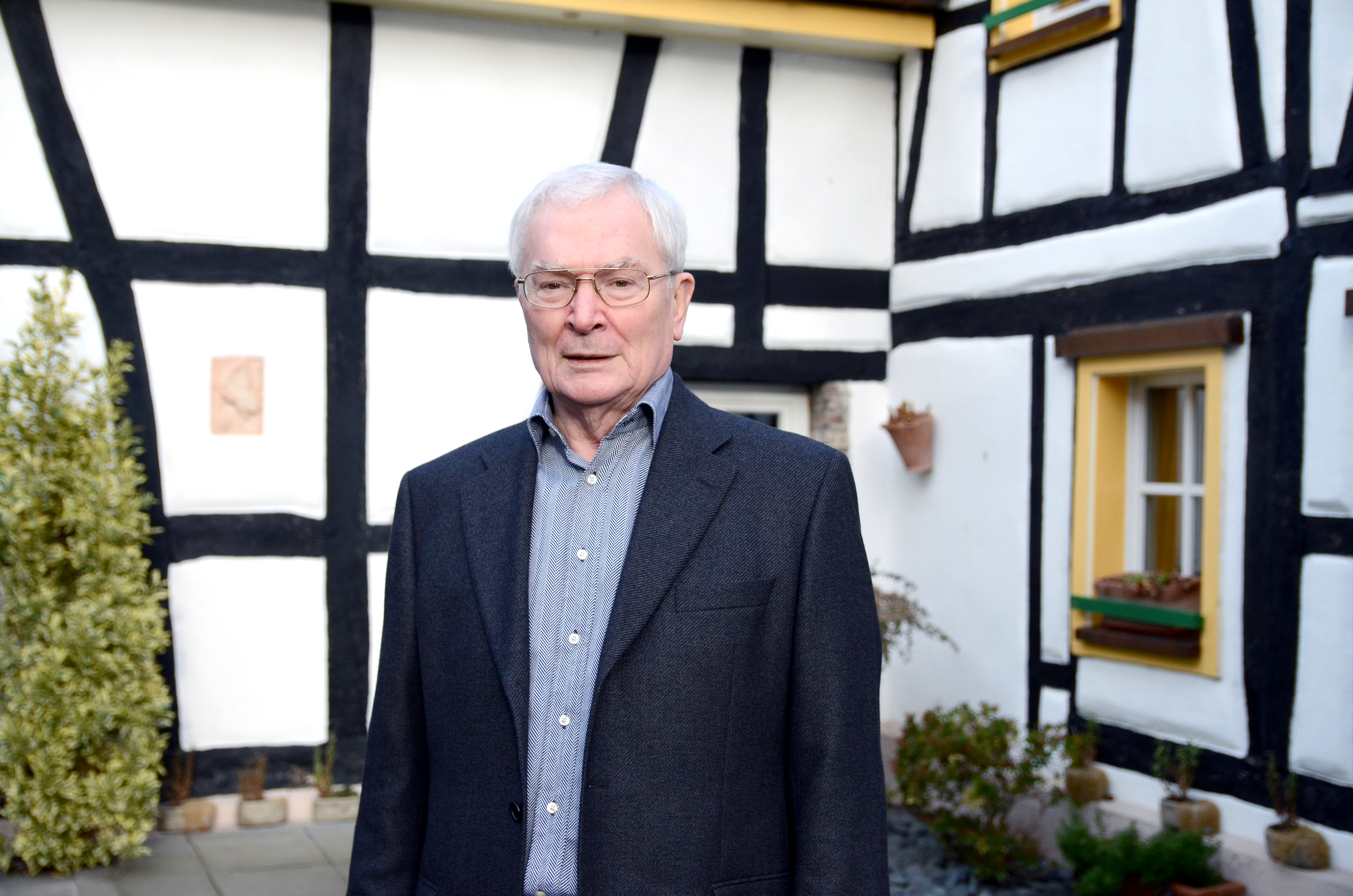 Peter Haas vor Haus Engländer (Restaurant Bierthe)